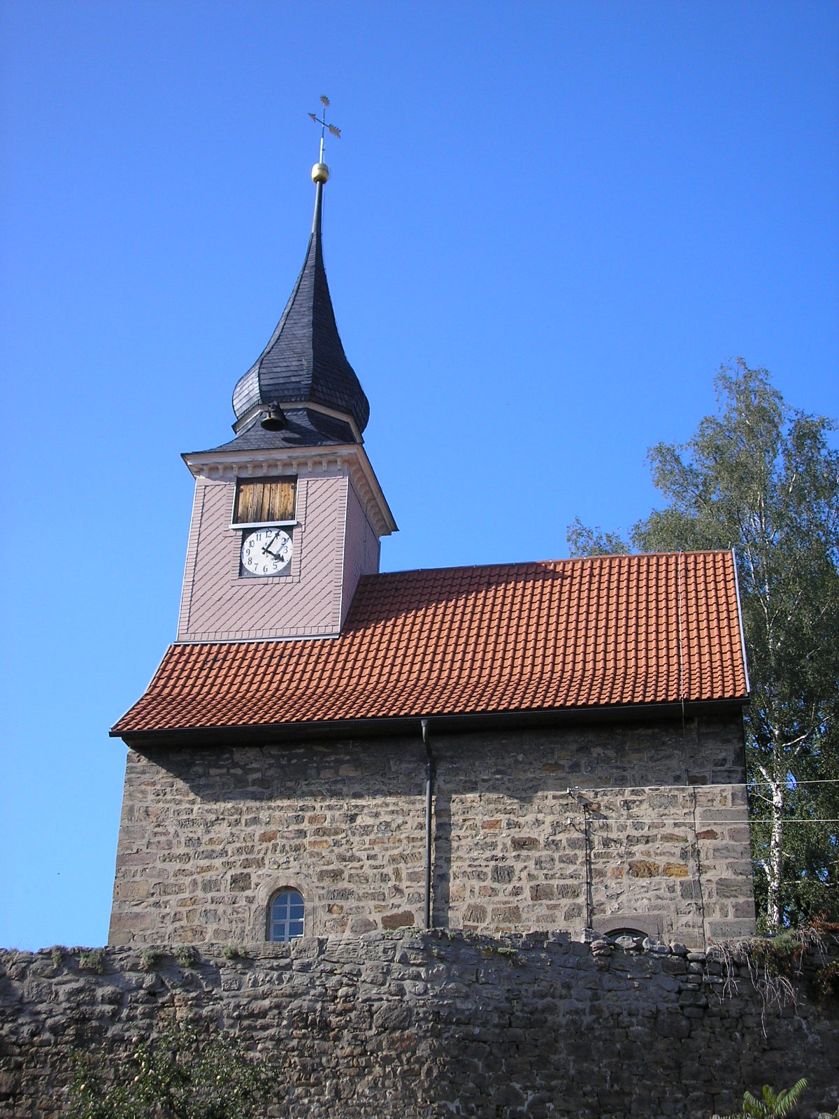 Die Dorfkirche von Wipfra, einem Ortsteil von Wipfratal im Ilm-Kreis (Thüringen, Deutschland).